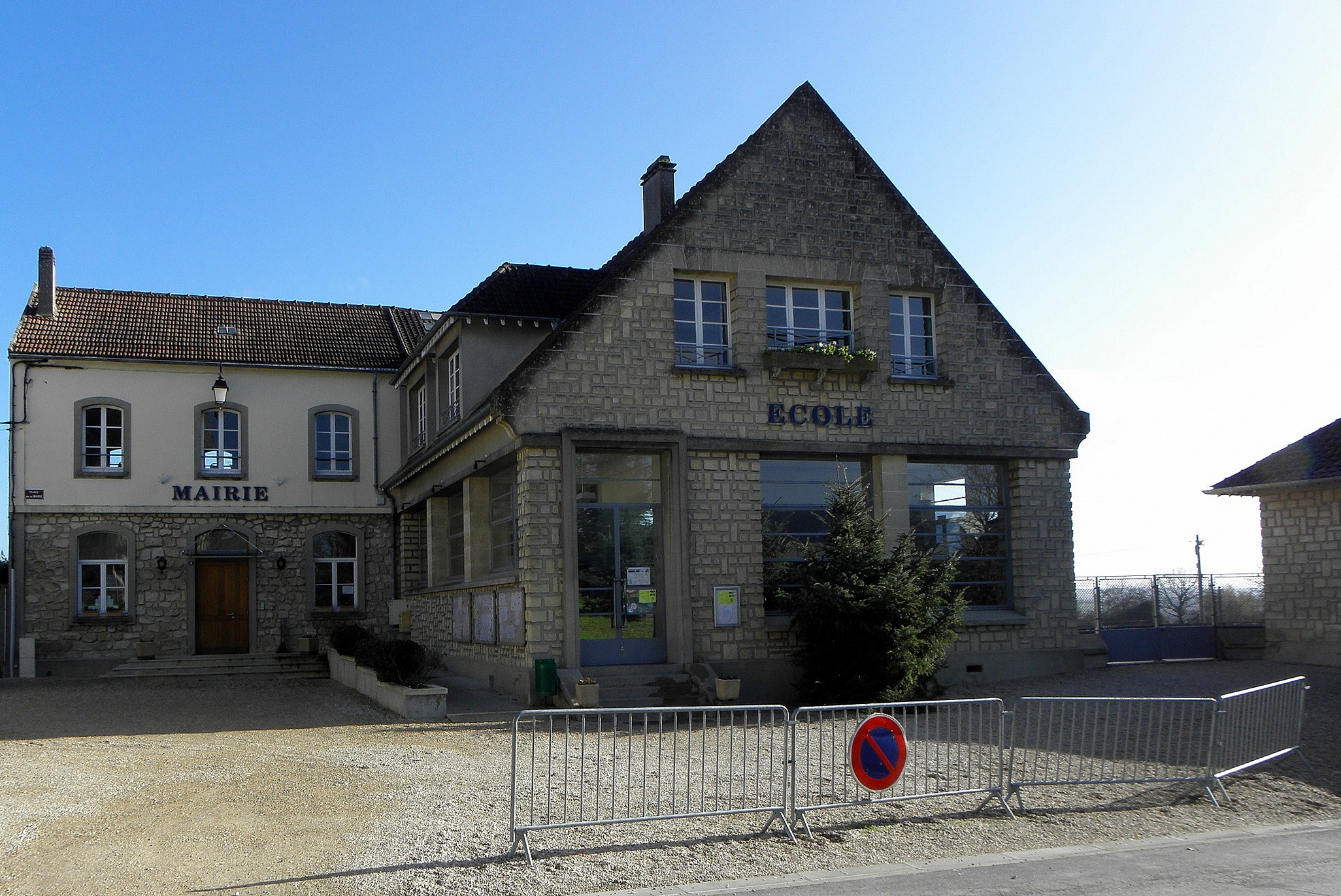 Mairie de may-en-Multien (77).